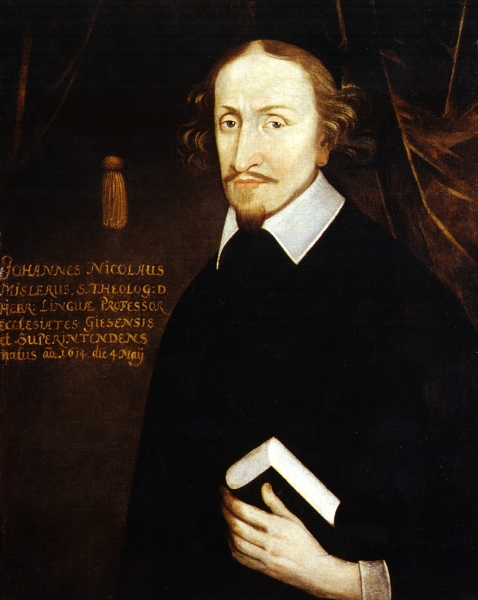 Prof. Johann Nikolaus Misler (1614-1683), Photographie eines Gemäldes der Professorengalerie